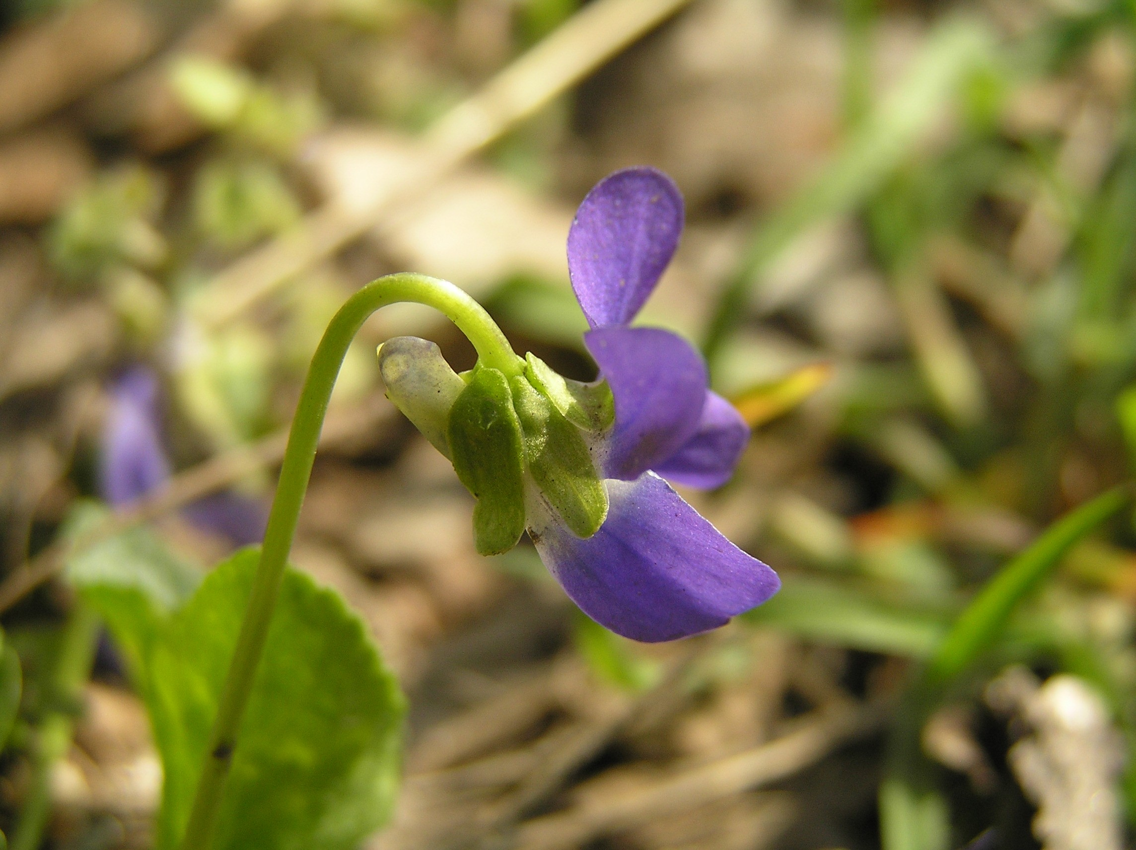 Viola suavis, Brno-Obřany, Czech Republic